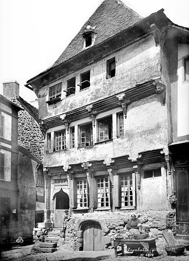 La maison du Bourreau à Lamballe, photographiée par Séraphin-Médéric Mieusement.